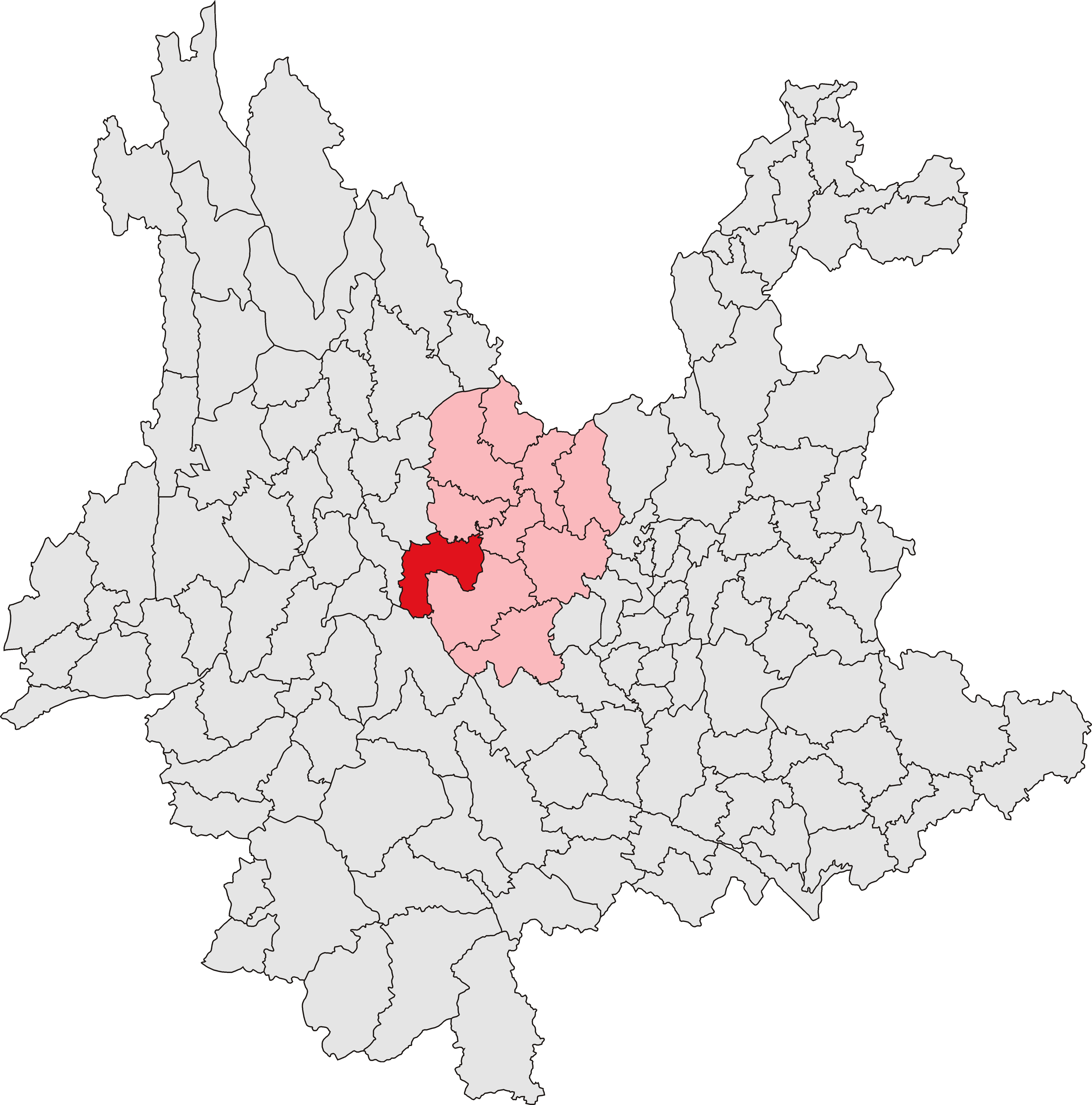 中文（中国大陆）: 南华县位置图